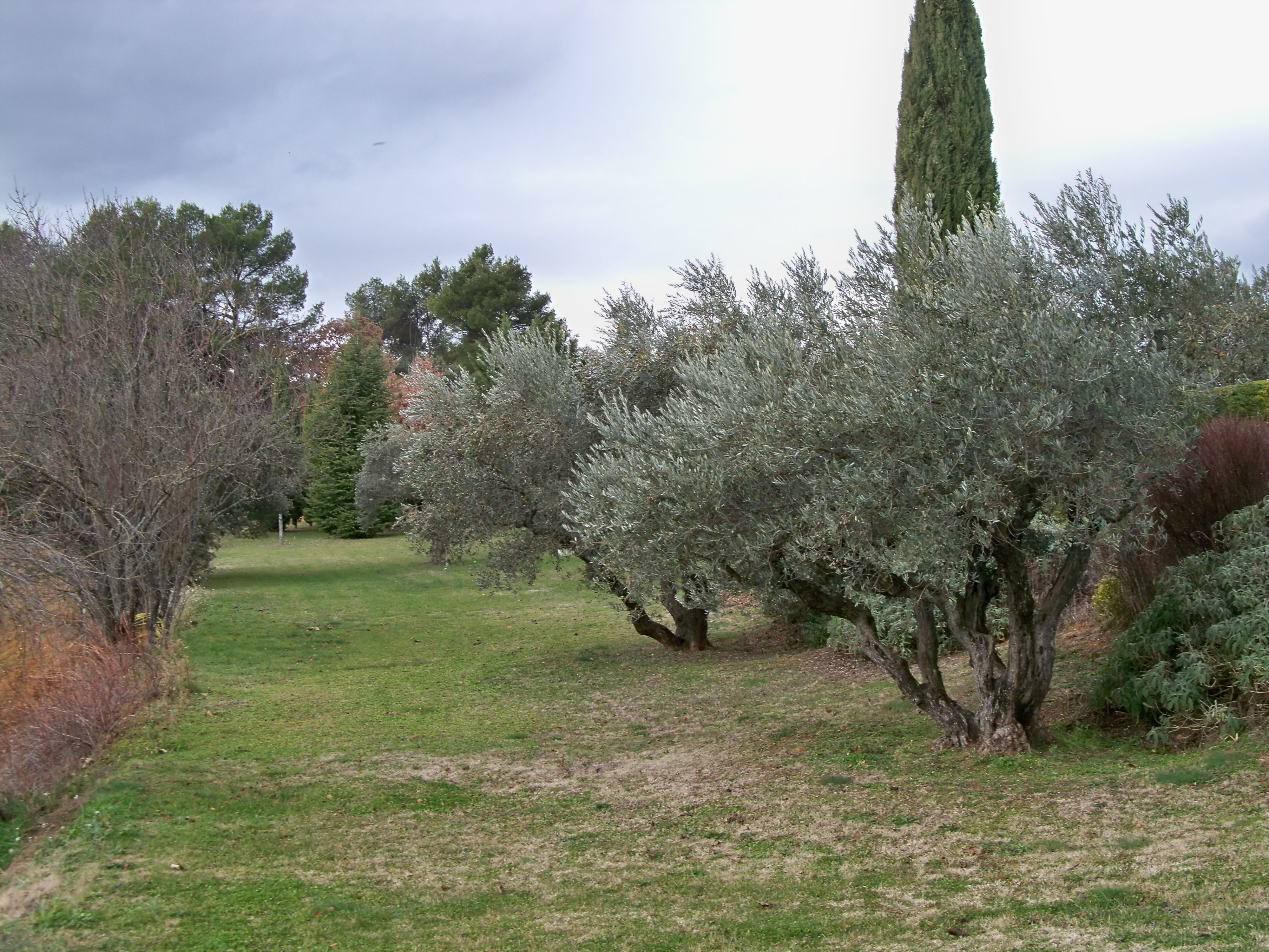 Olivier dans le hameau de Rochefure, Apt (Vaucluse)